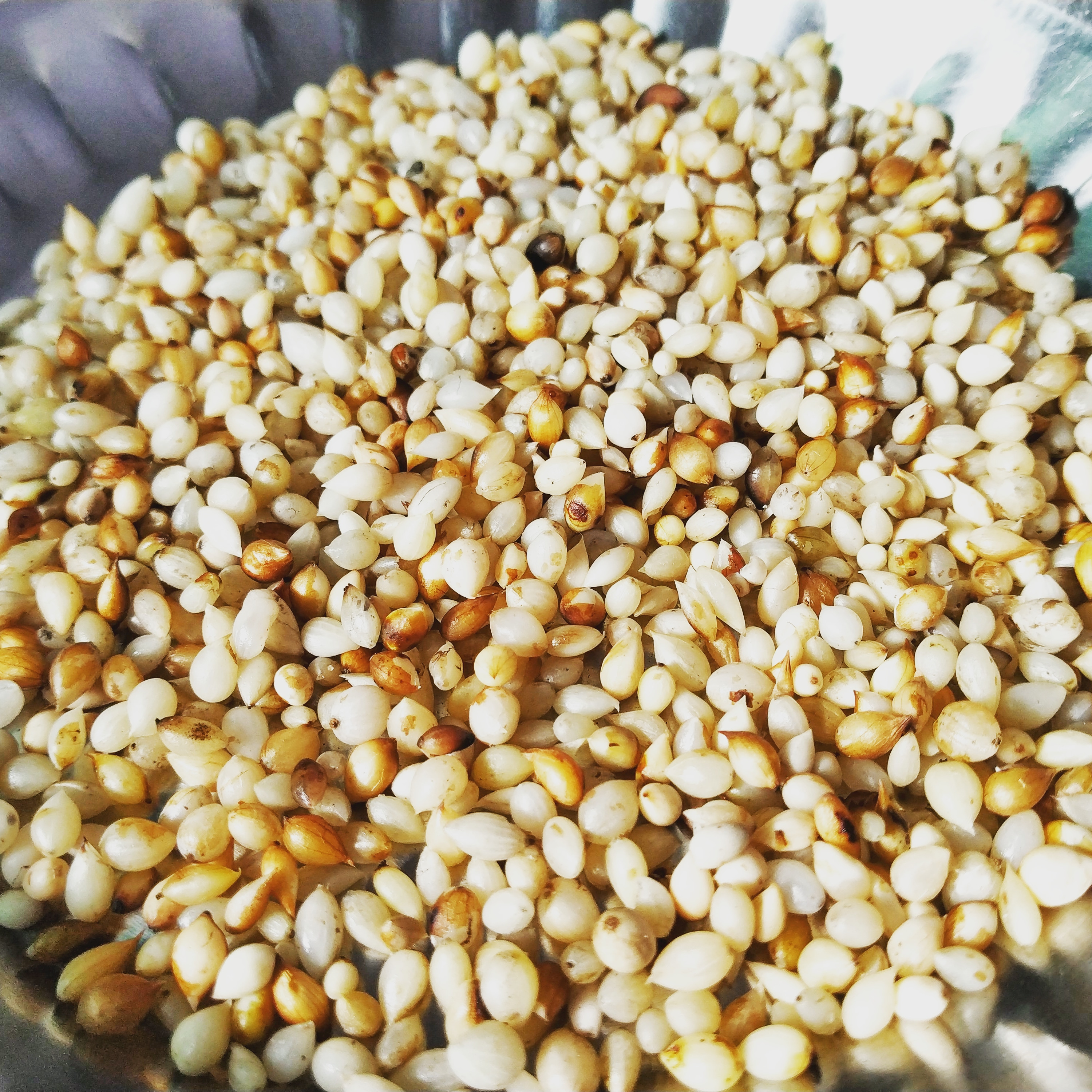 ગુજરાતી